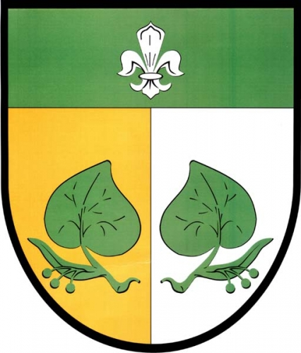 Znak, Příluka, okres Svitavy